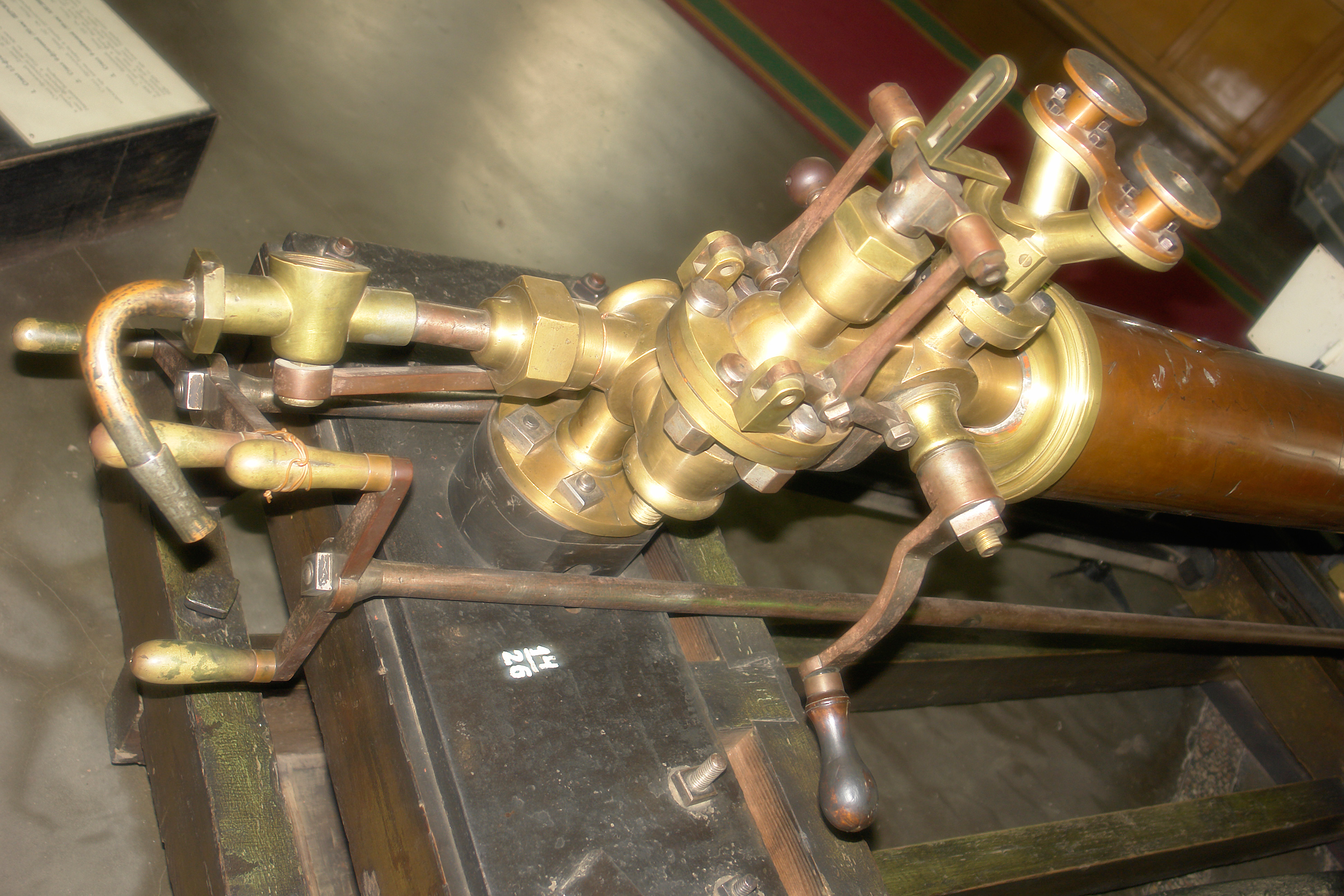 7-линейная (17.5-мм) опытная паровая пушка. Ствол: зелёная медь в кожухе из красной меди. Разработана инженер-полковником корпуса путей сообщения Карелиным. Изготовлена в 1826-29, Стрельба шаровыми пулями за счёт водяного пара, до 50 выстрелов в минуту. Испытания в 1829 году провалились и пушка была передана в арсенал Санкт-Петербурга. Военно-исторический музей артиллерии, инженерных войск и войск связи, Санкт-Петербург.